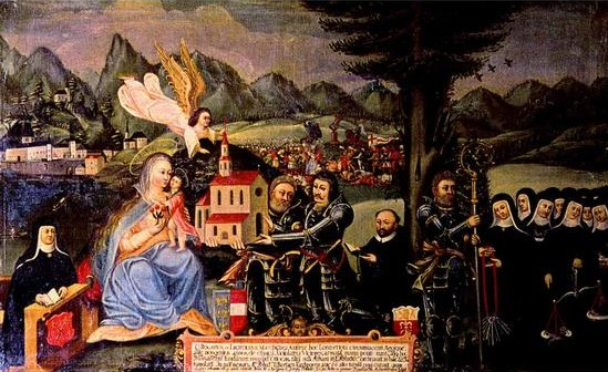 Kloster Traunkirchen - arstellung der Gründungsgeschichte des Klosters Traunkirchen: Otakar I. von Steier (rechte Bildhälfte) übergibt seiner Schwester Ata, der ersten Äbtissin des Klosters, Stab und Schlüssel.